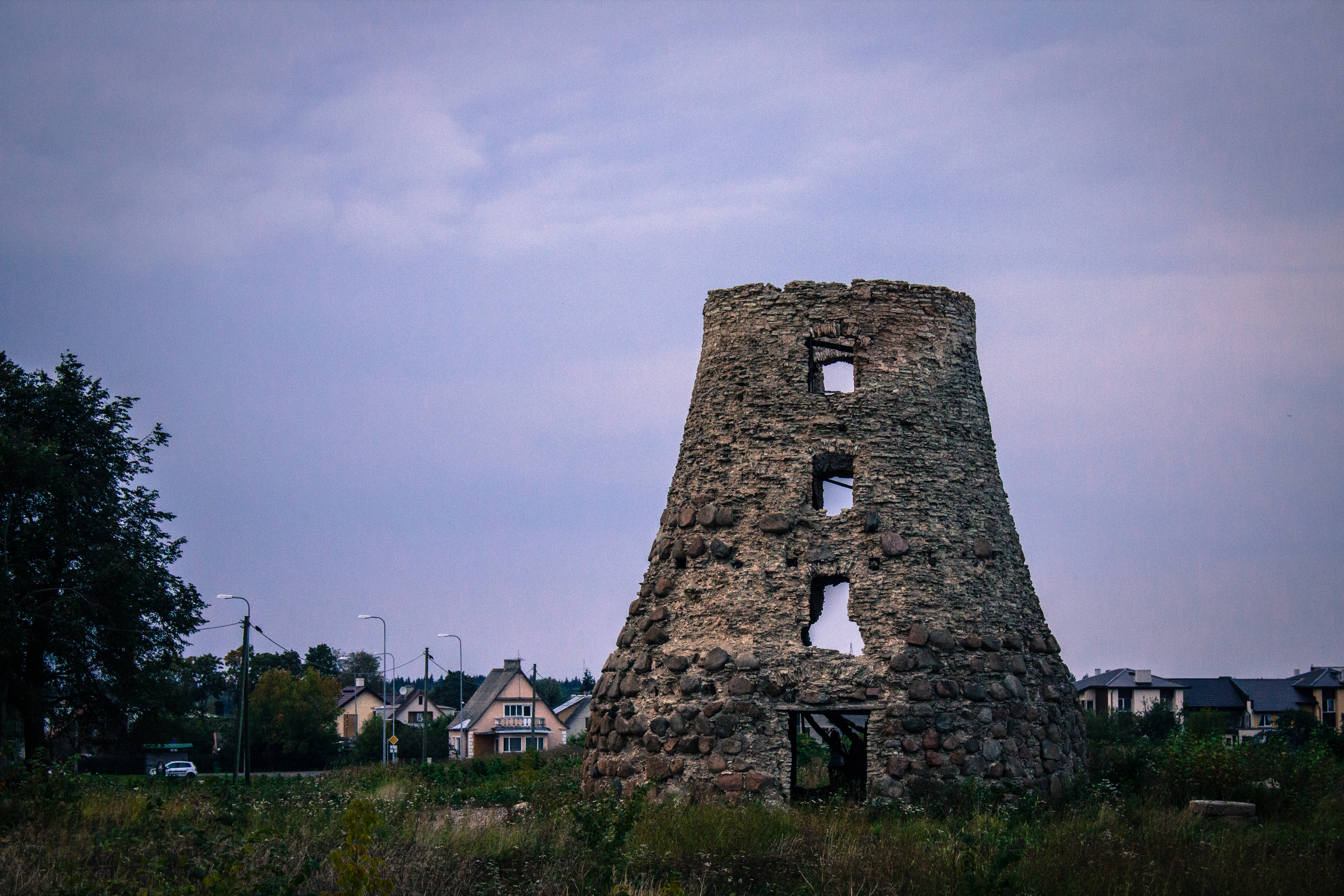 Järve mõisa tuuleveski,19.saj.